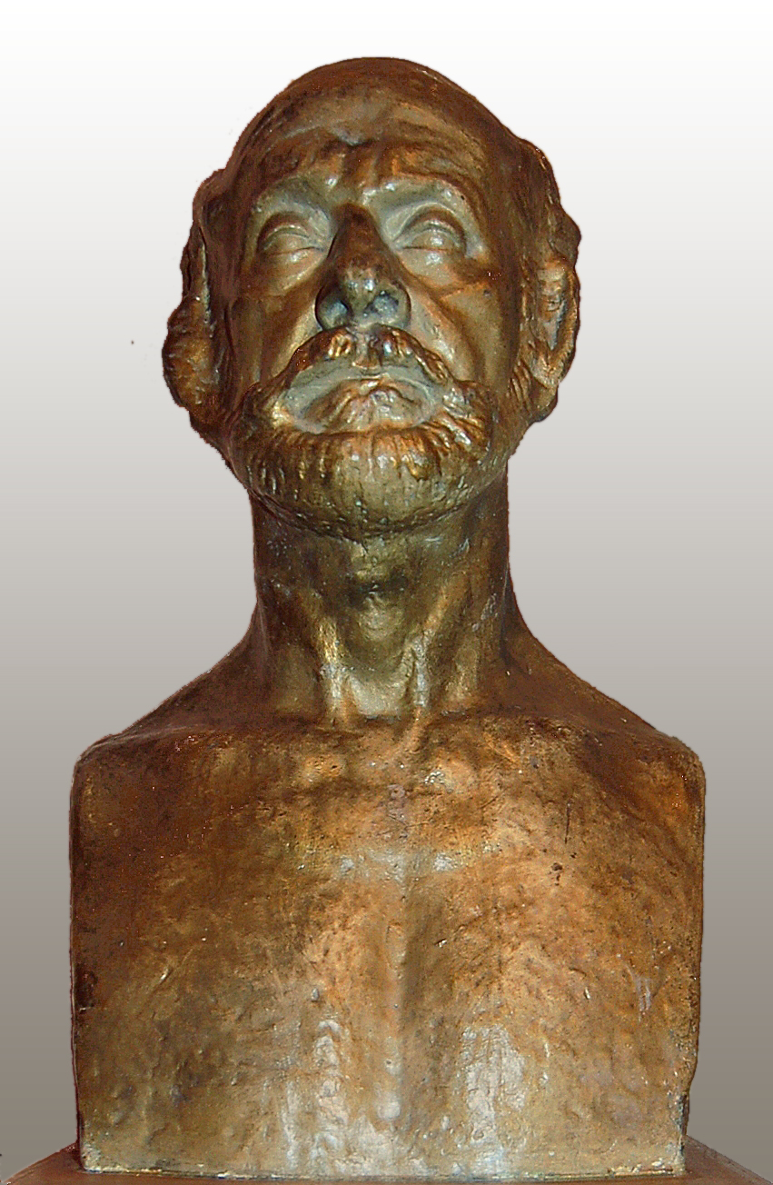 Buste d'Auguste Perret exposé dans la Salle Cortot à Paris (Buste fait par Antoine Bourdelle, (October 30, 1861 - October 1, 1929))